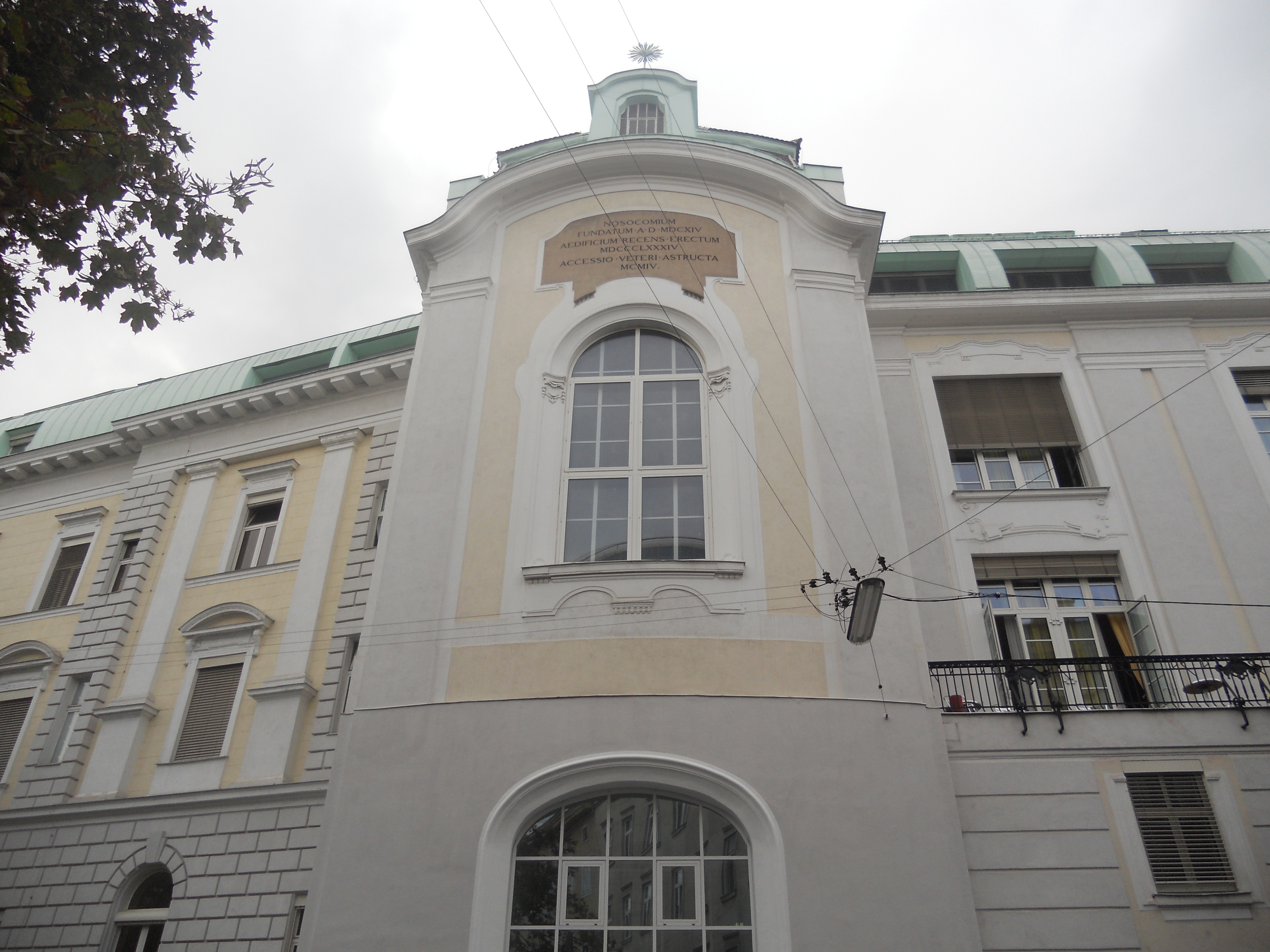 Das Krankenhaus der Barmherzigen Brüder in Wien